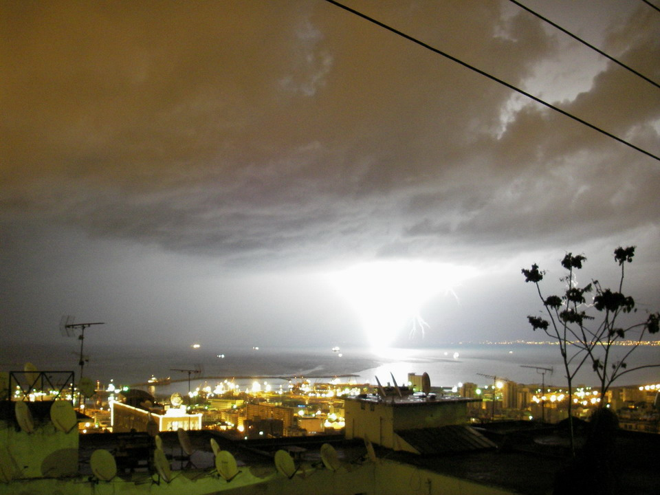 Alger sous l'orage, Algérie.